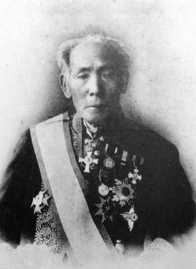 a Japanese man 佐野常民 (Tsunetami Sano)